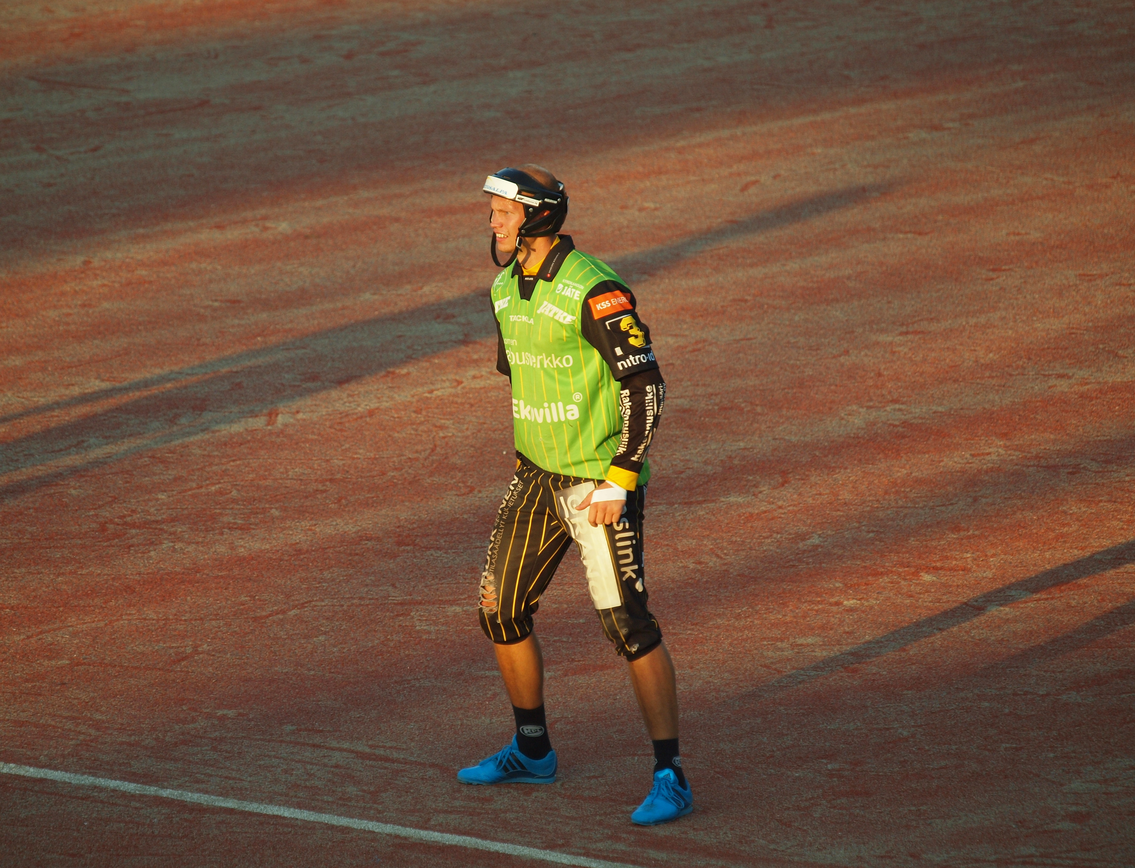 Vimpelin Veto - Kouvolan Pallonlyöjät pesäpallo-ottelu 5.8.2014. Kuvassa Juho Hacklin.